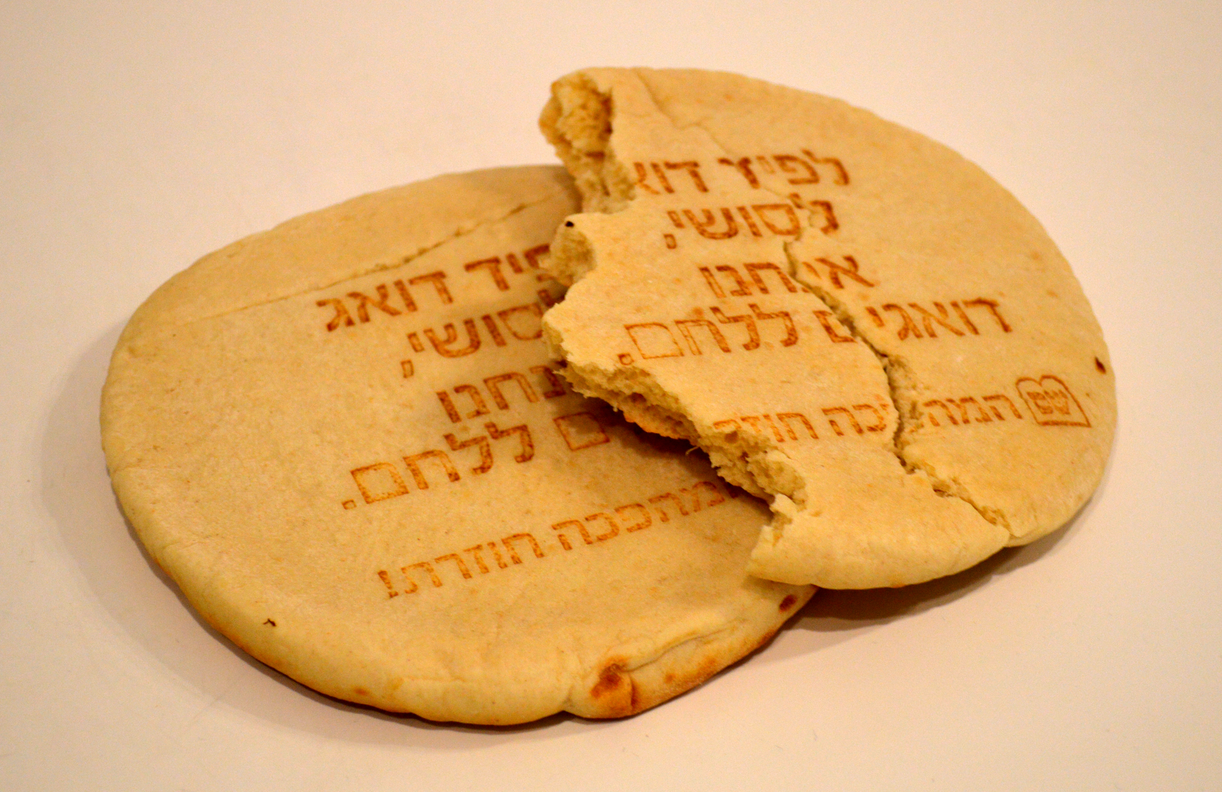 פיתות טריות שחילקו פעילי מפלגת ש"ס במהלך בחירות 2015. על הפיתות מופיע ההדפס: "לפיד דואג לסושי, אנחנו דואגים ללחם." וסיסמת הבחירות של המפלגה ב- 2015: "המהפכה חוזרת!".